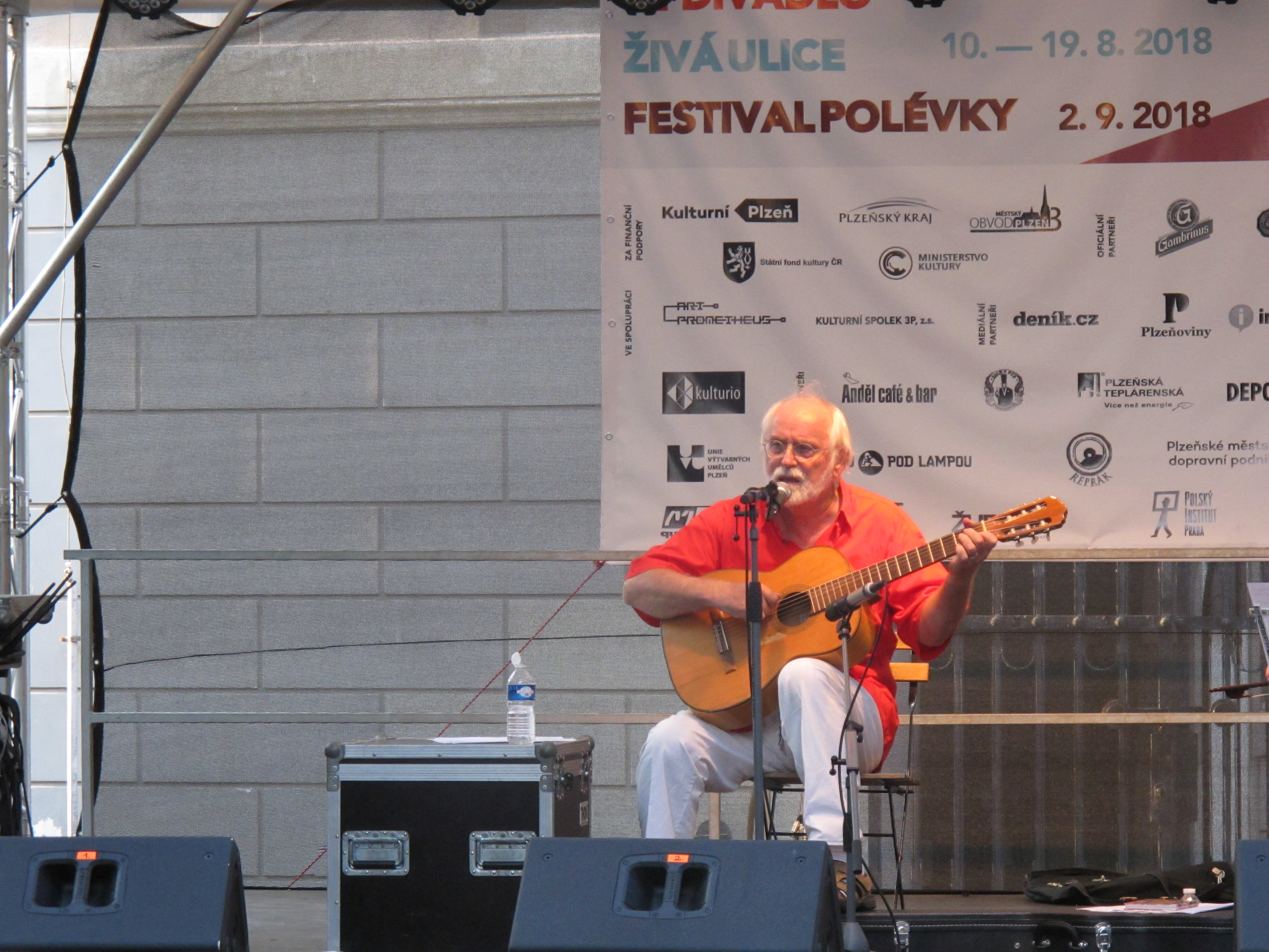 Bohdan Mikolášek během vystoupení na festivalu Živá ulice 2018 v Plzni.